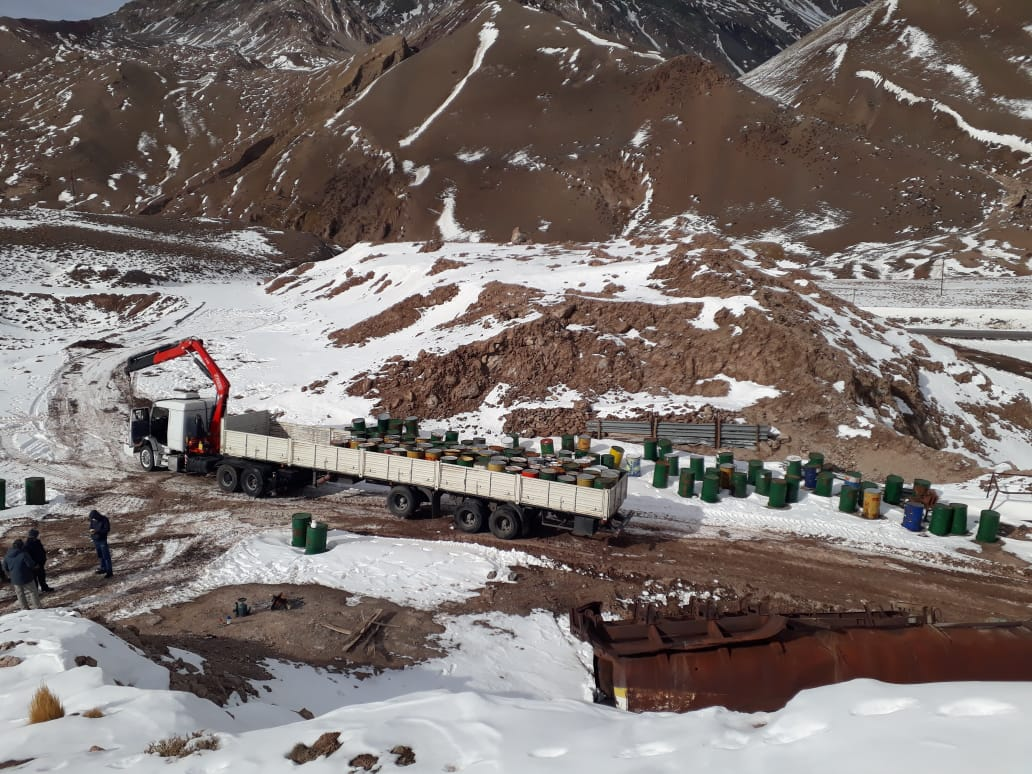 Retiro de tambores de materia feca temporada 2018-2019 del Parque Aconcagua